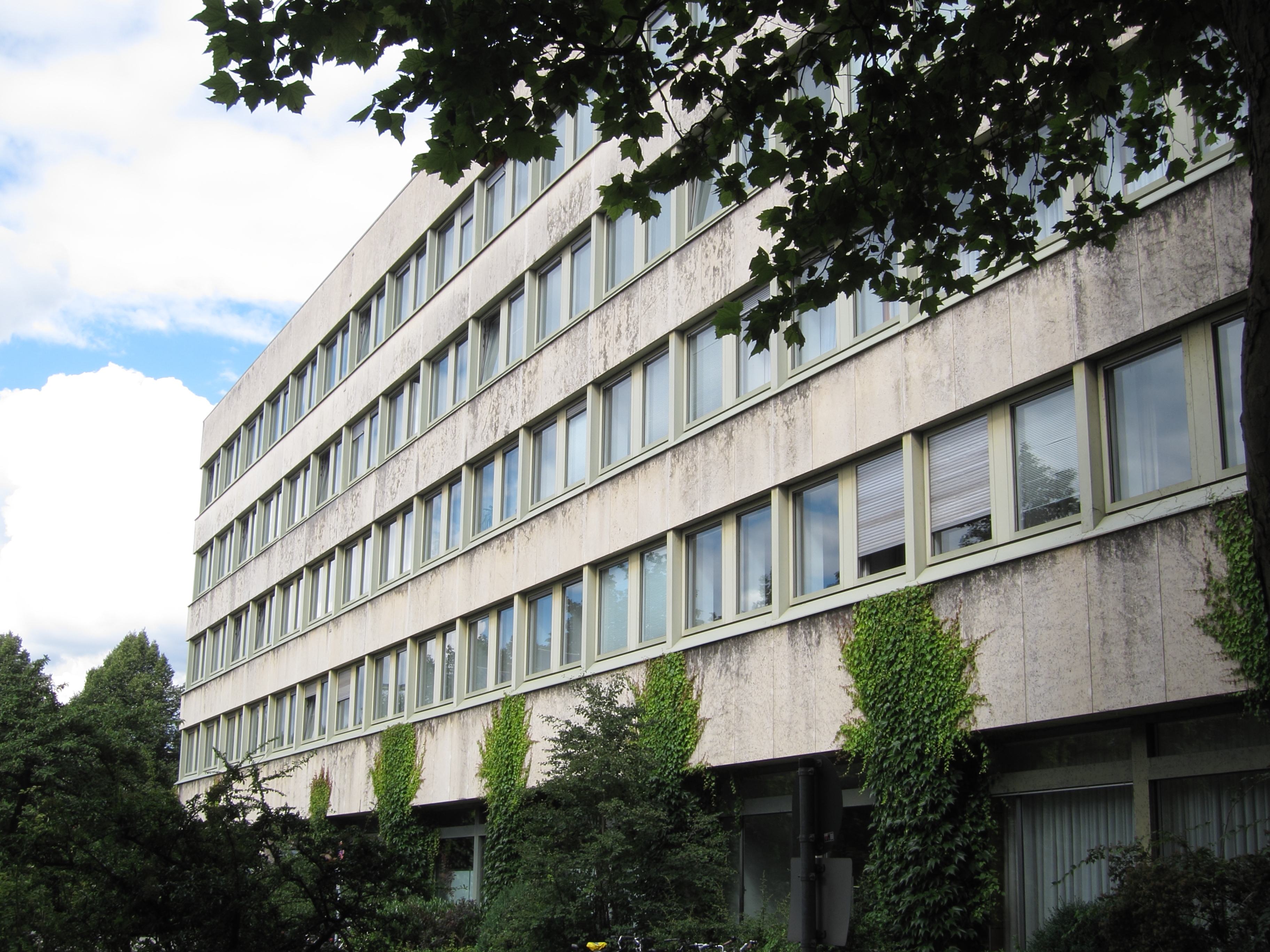 Oberste Baubehörde im Bayerischen Staatsministerium des Inneren, Franz-Josef-Strauß-Ring 4, 80539 München